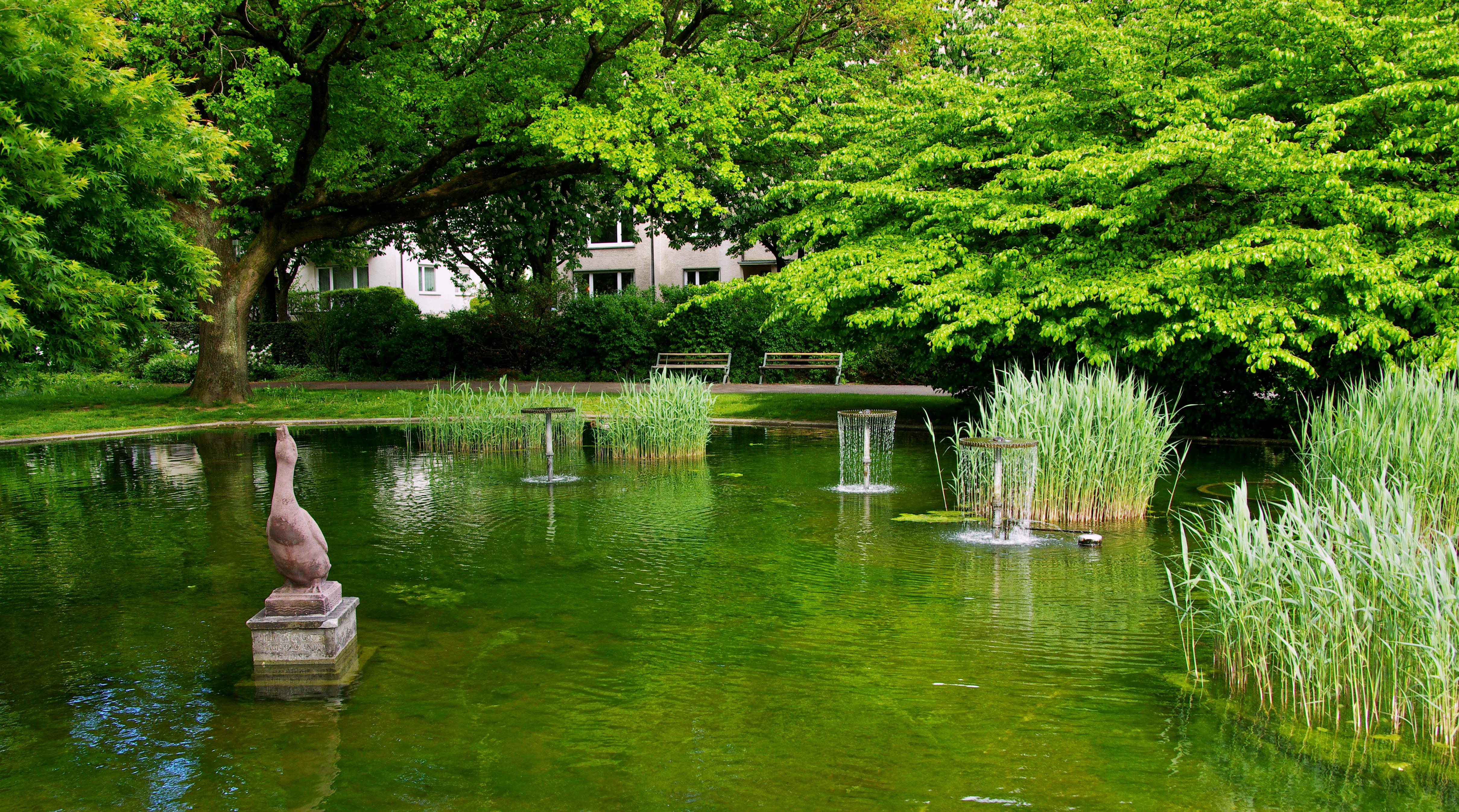 Freiburger Erpel und Teich